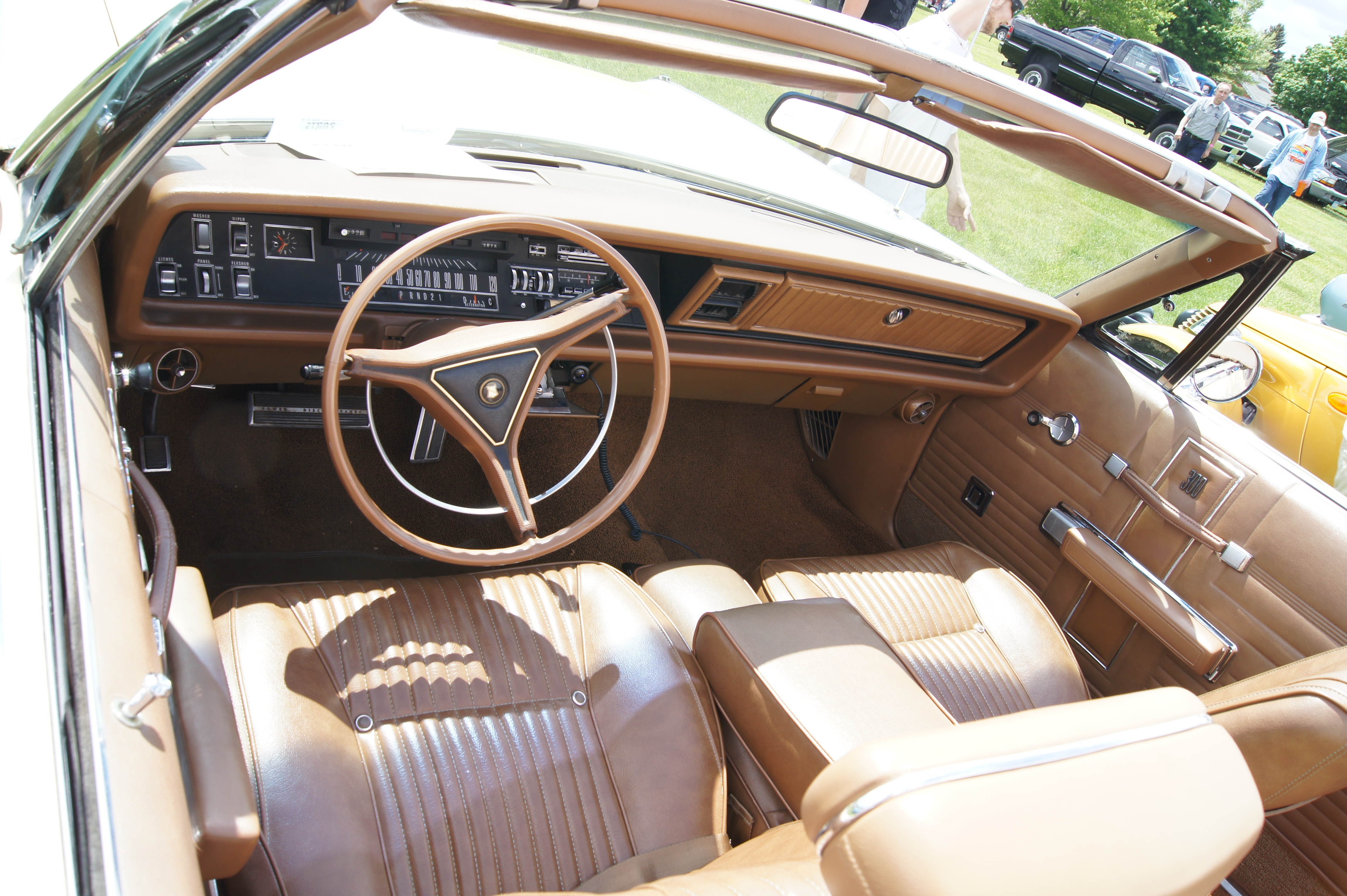 70 Chrysler 300